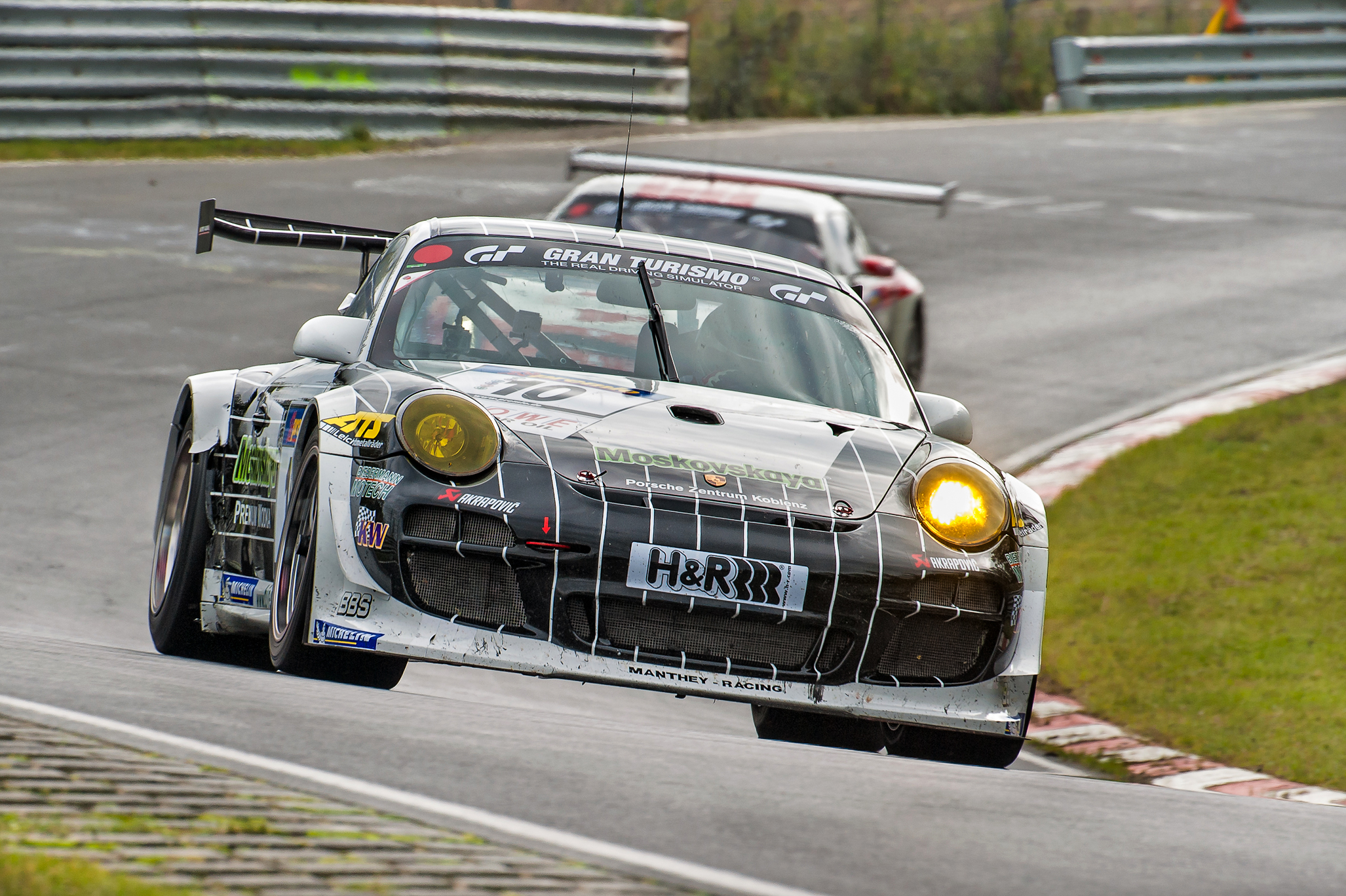 Porsche 911 GT3 beim 9. Lauf der VLN-Serie auf dem Nürburgring.